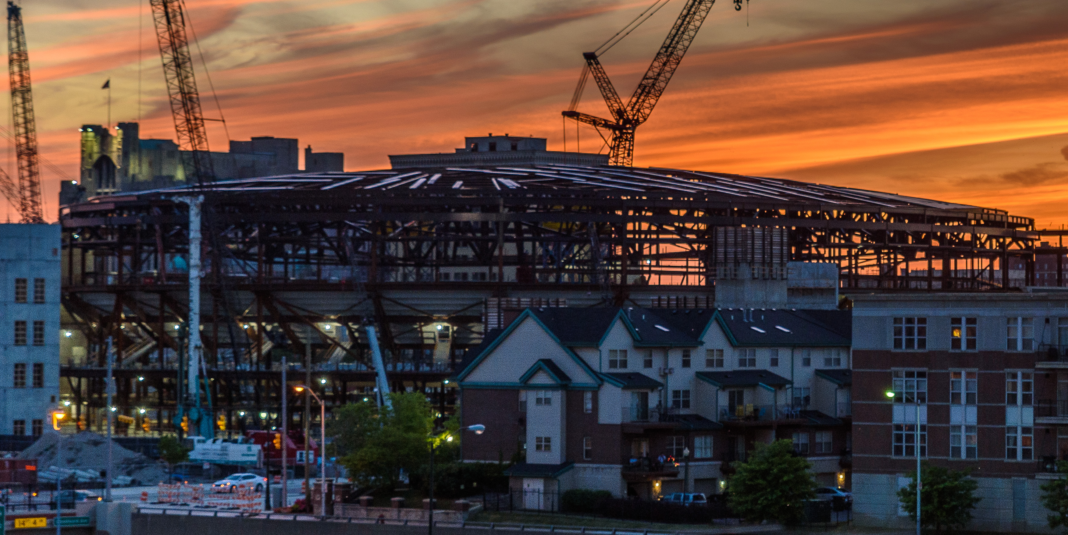 Little Caesars Arena 06-03-2016